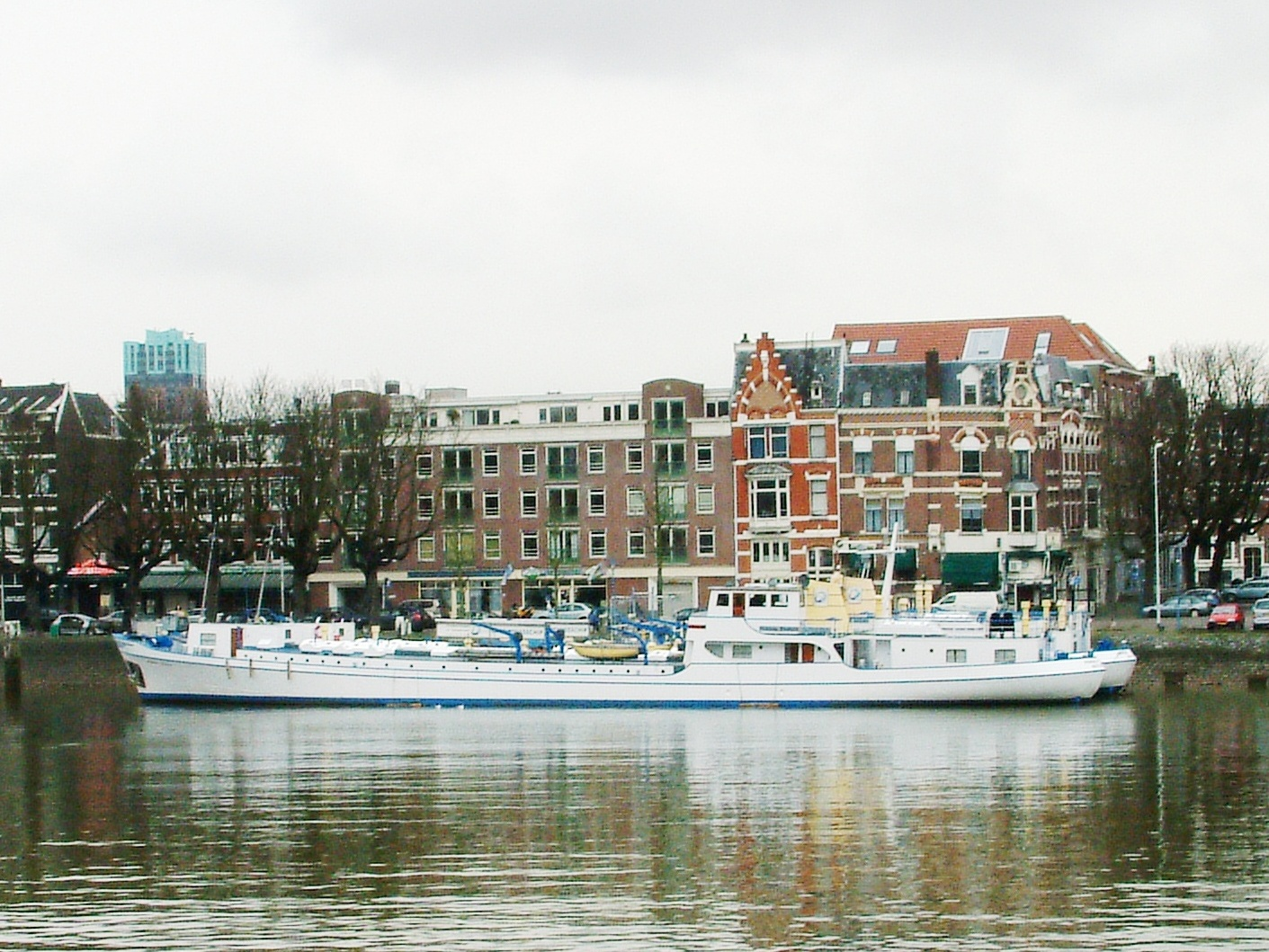 Schepen van het Scheepvaart en Transport College, vroeger van het Koninklijk Onderwijs Fonds voor de scheepvaart, vandaar bekend als KOF-schepen